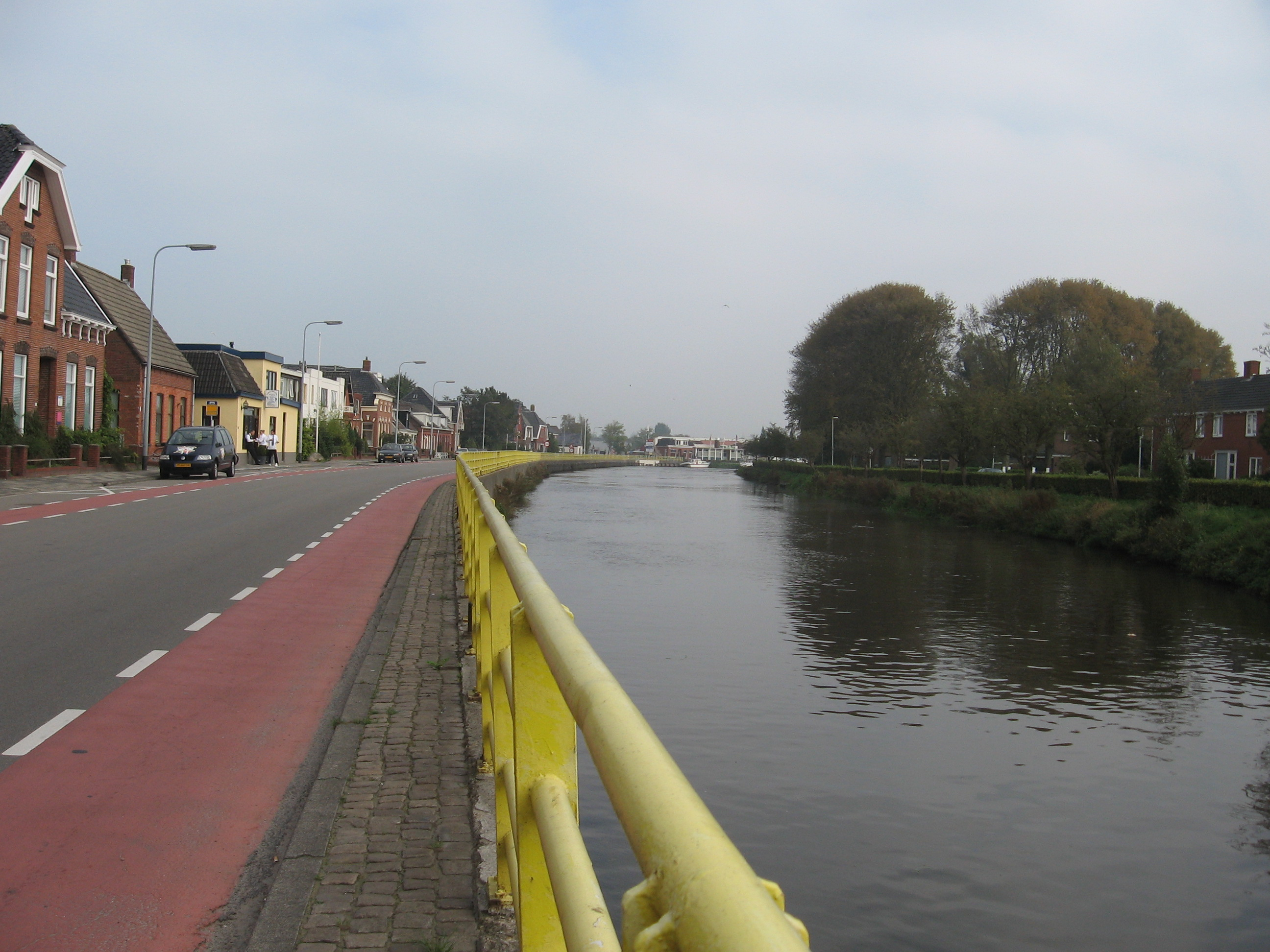 Het Hoendiep, genomen aan het Hoendiep in Groningen.